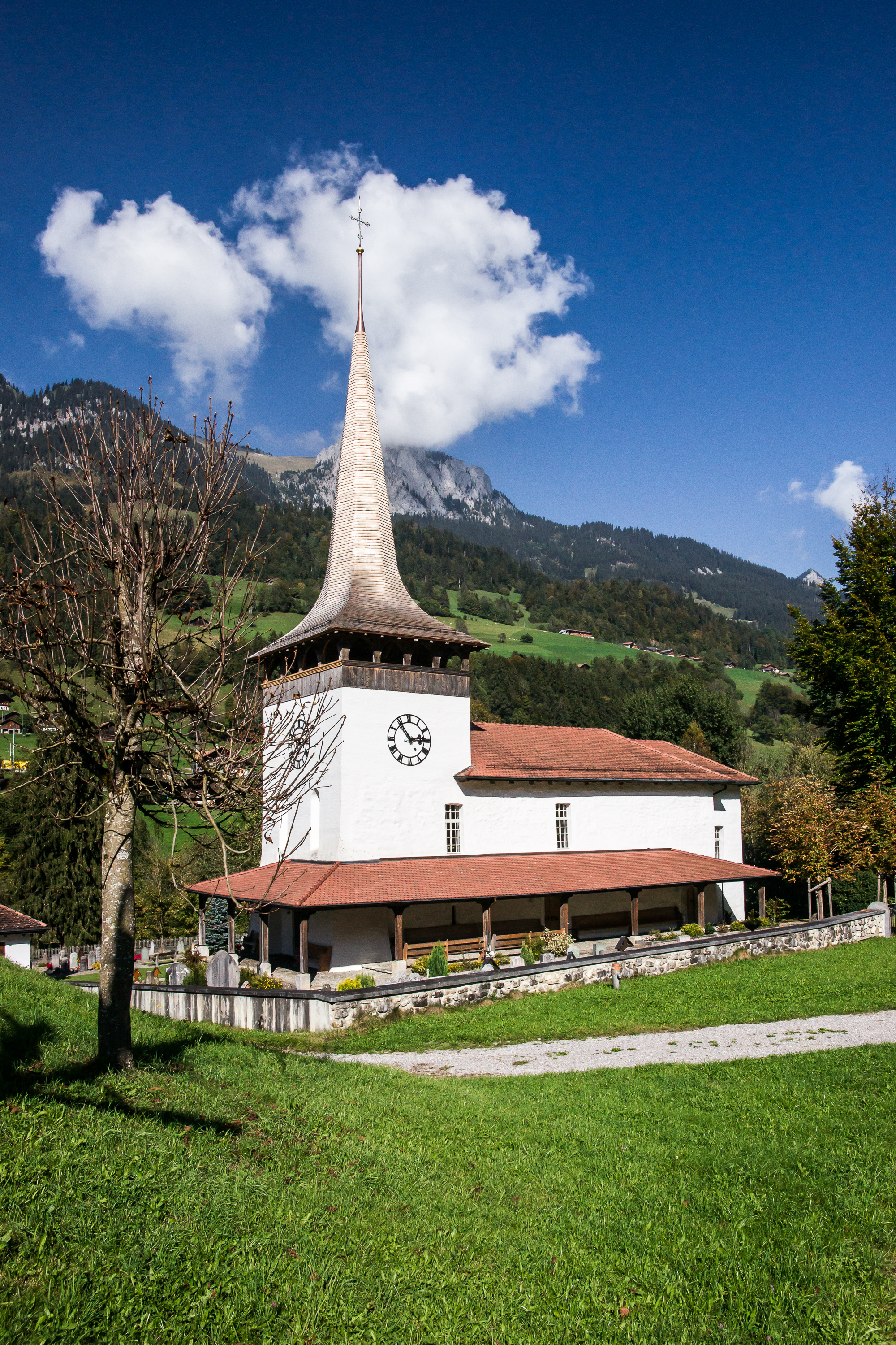 Reformierte Kirche auf der sog. Schattseite des Simmentales